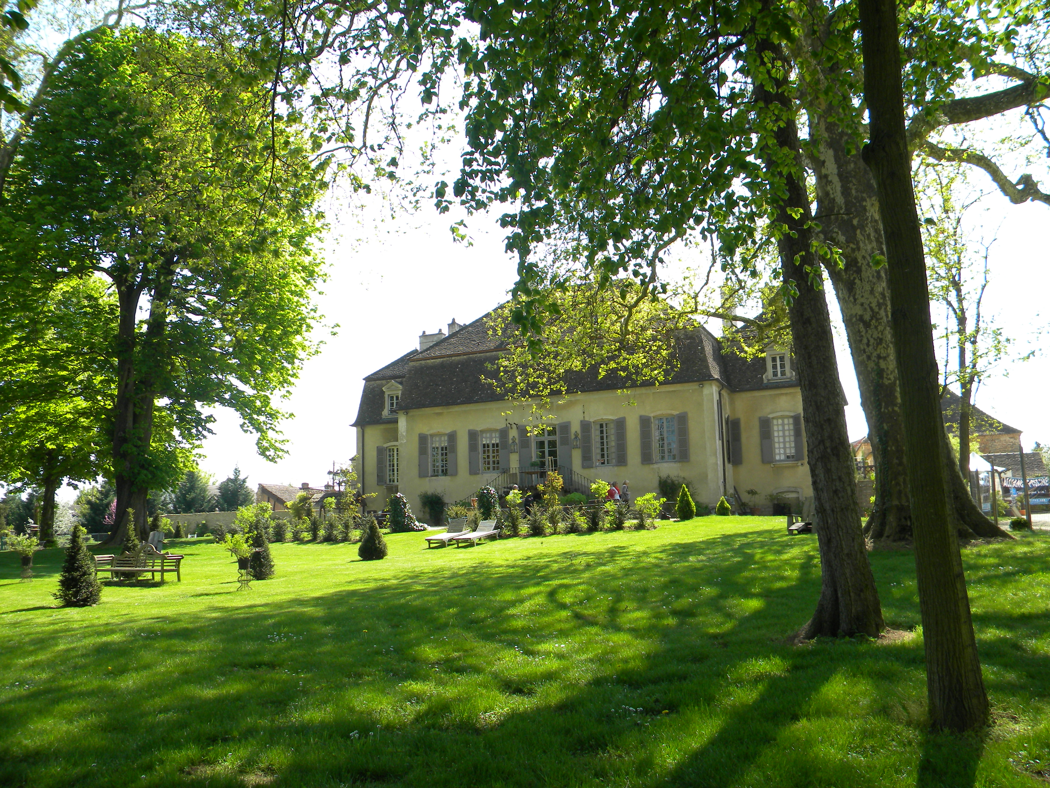 Kastelo de Meursanges